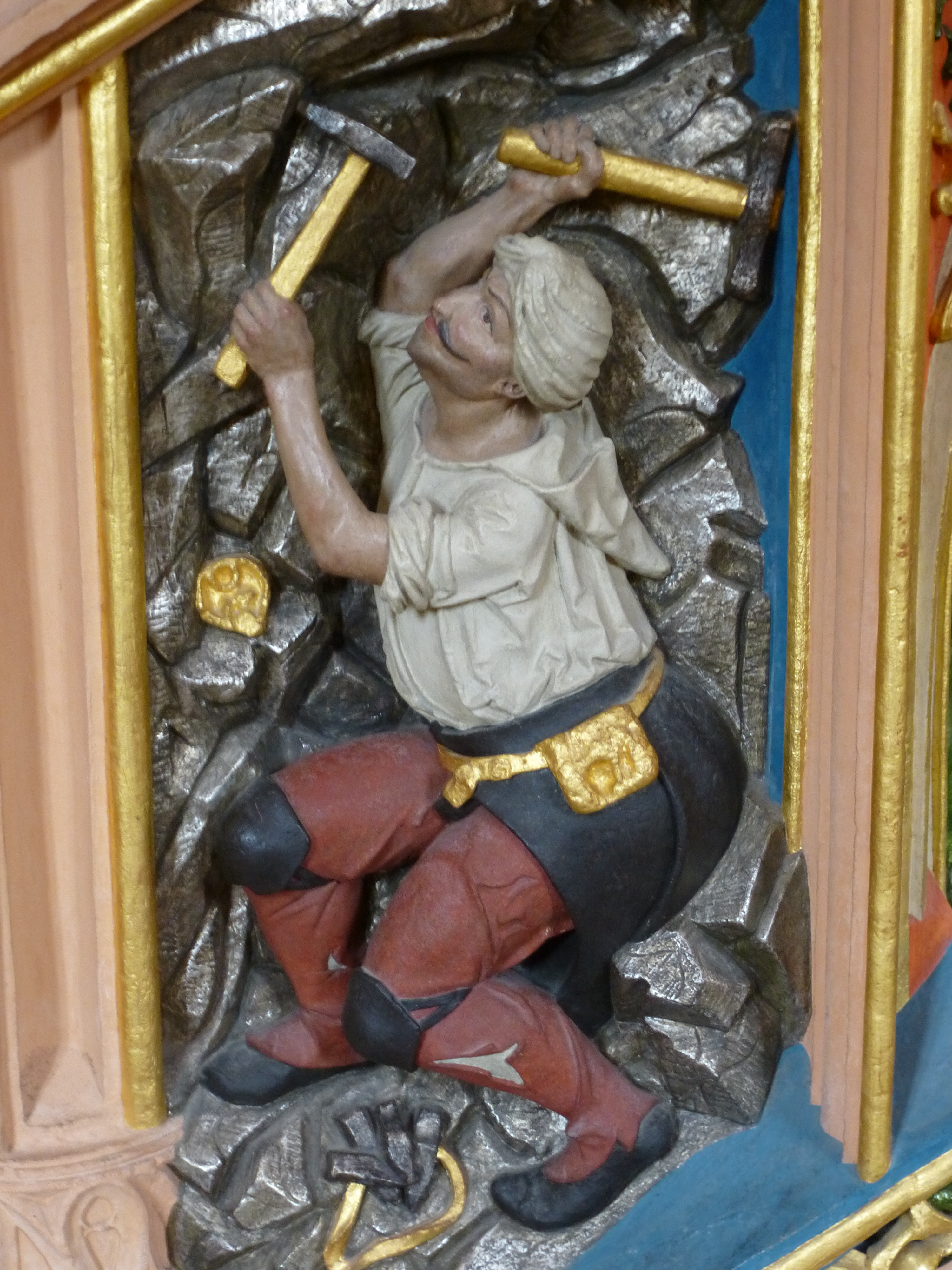 Mineur sur la chaire (découverte de gisements d'argent et d'étain dans la région vers 1490)